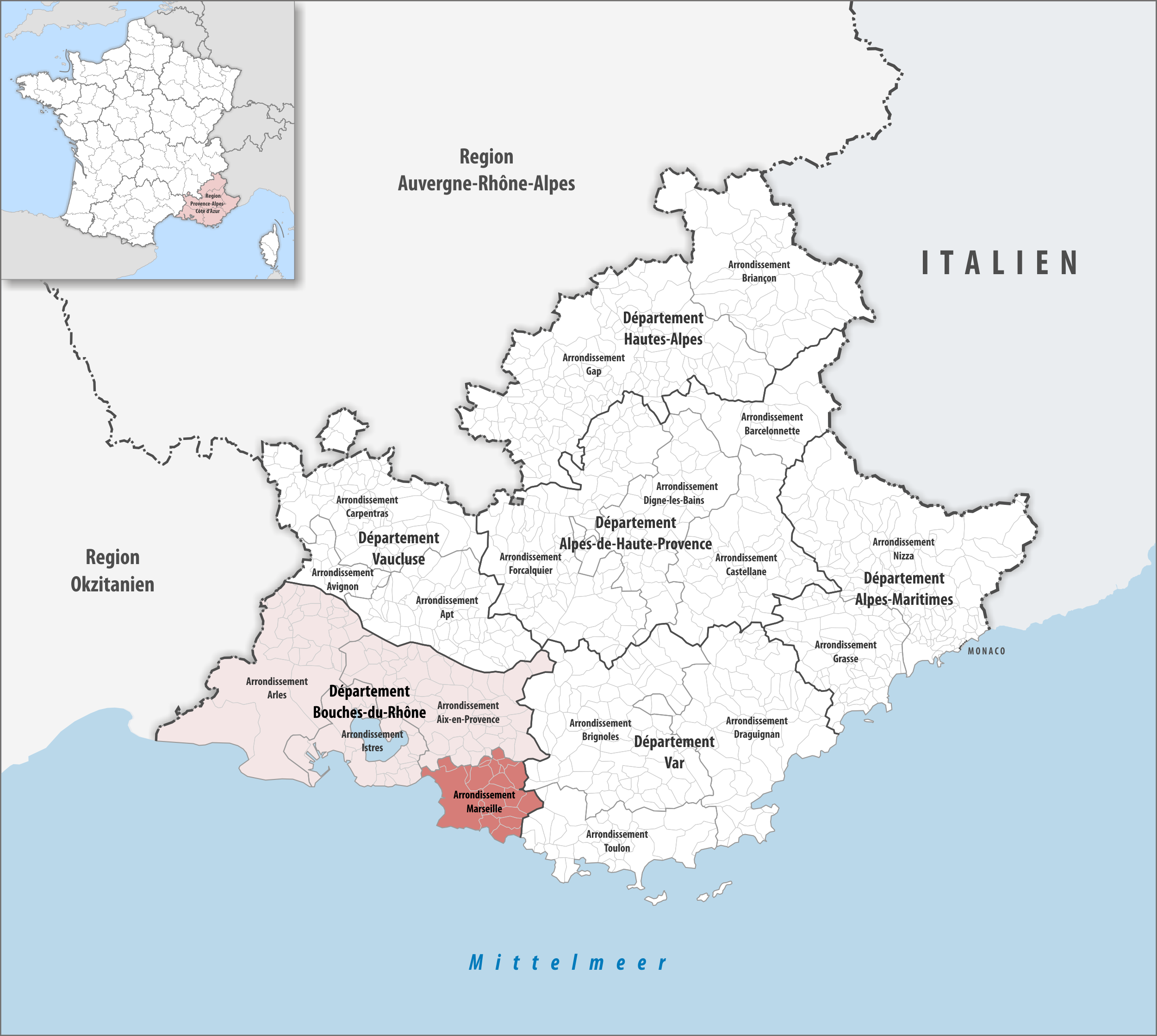 Lage des Arrondissements Marseille